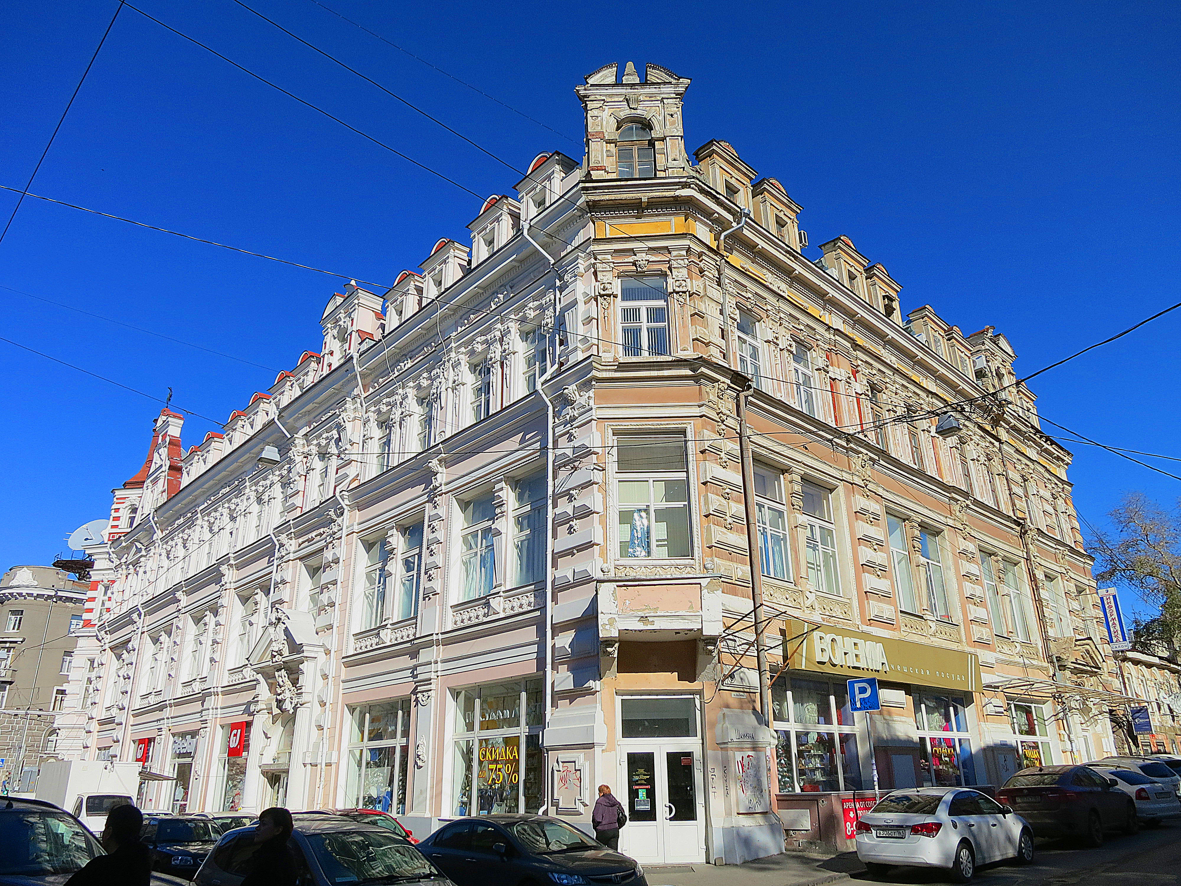 Дом купца Генч-Оглуева (Ростовская область, Ростов-на-Дону, Большая Садовая улица, 68)